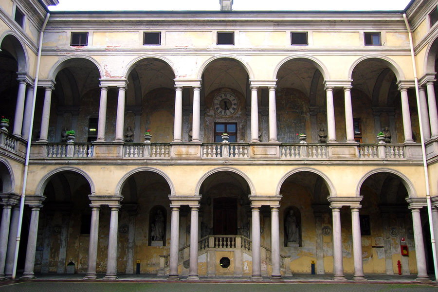 Quadriportico all'ingresso dell'Ospedale Maggiore di Novara